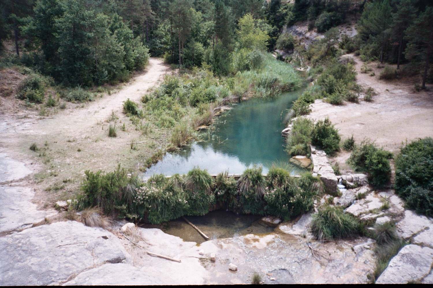 La Resclosa del Molí d'en Sala (Monistrol de Calders, Moianès)